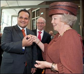 Beatrix der Nederlanden